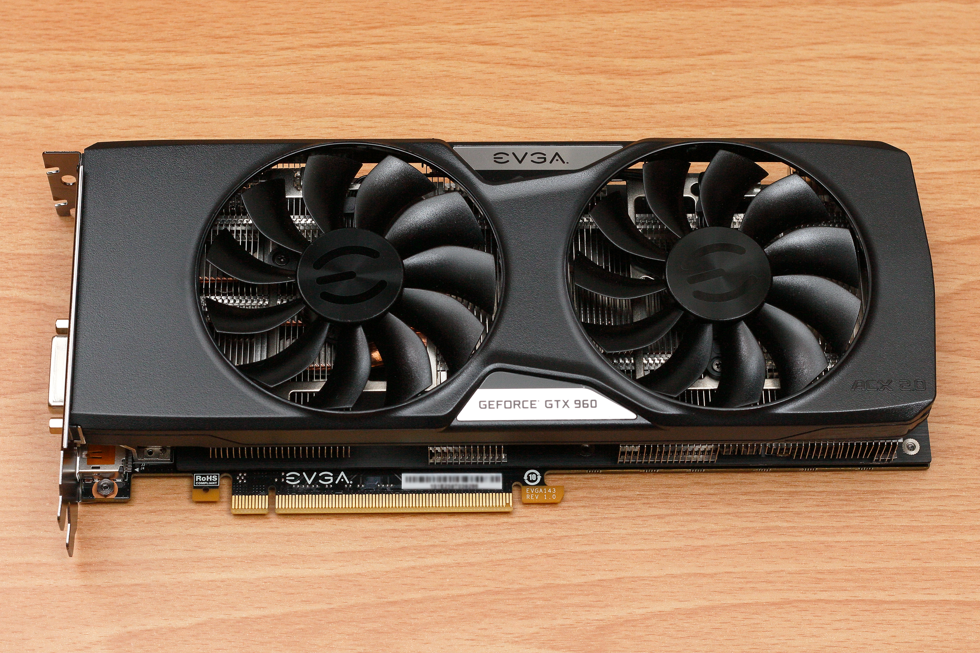 艾維克（EVGA）顯示卡「EVGA GeForce GTX 960 SuperSC ACX 2.0+」（型號為02G-P4-2966-KR）正面。